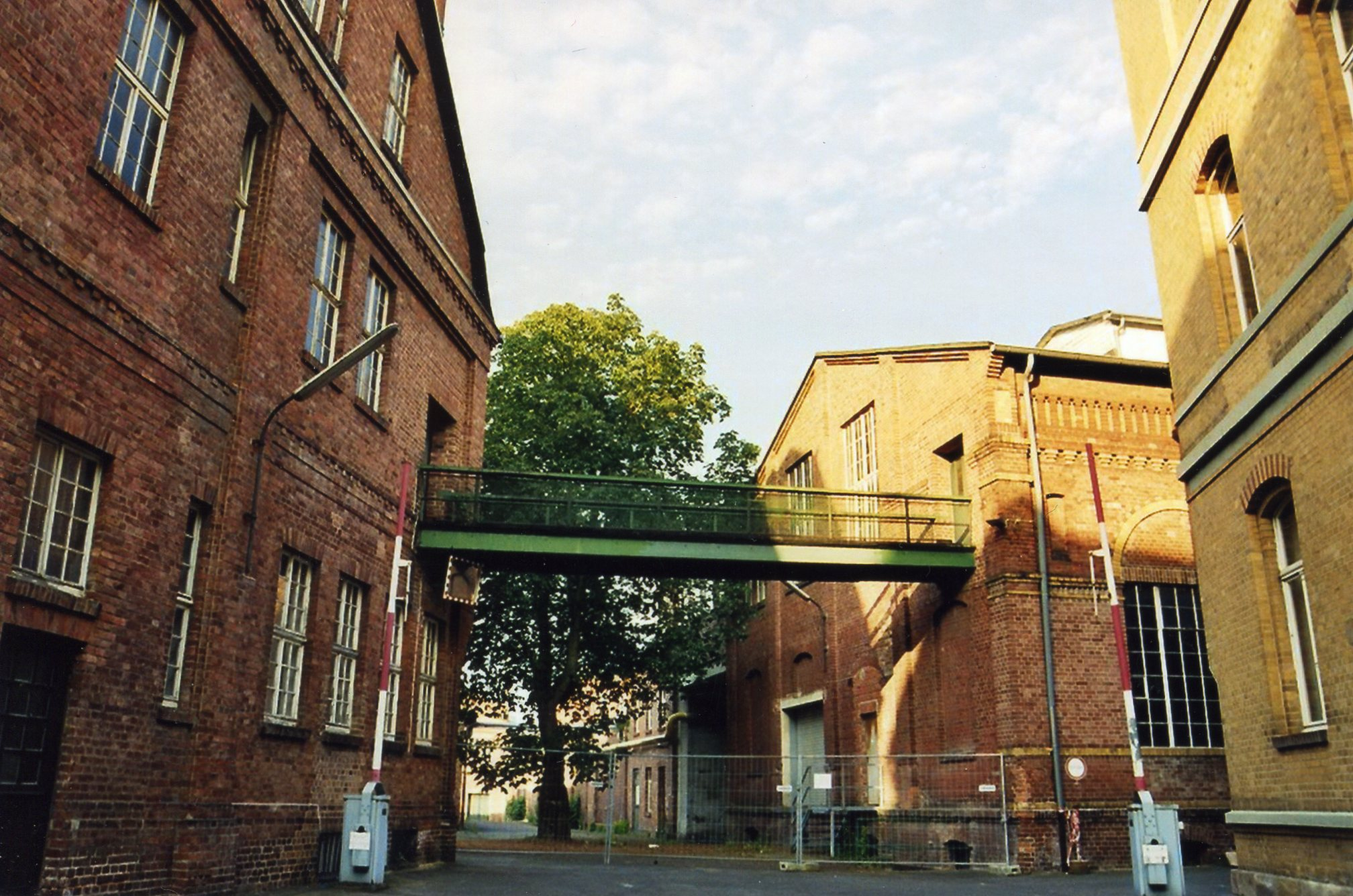 Detail auf dem Campus der Uni Kassel, 2007